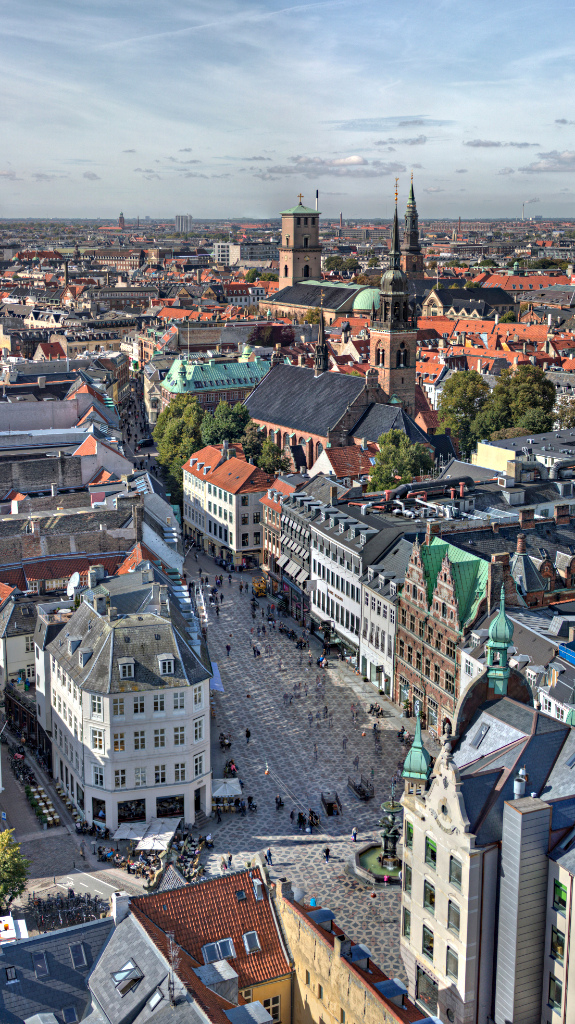 Amagertorv from Nikolaj Kirken